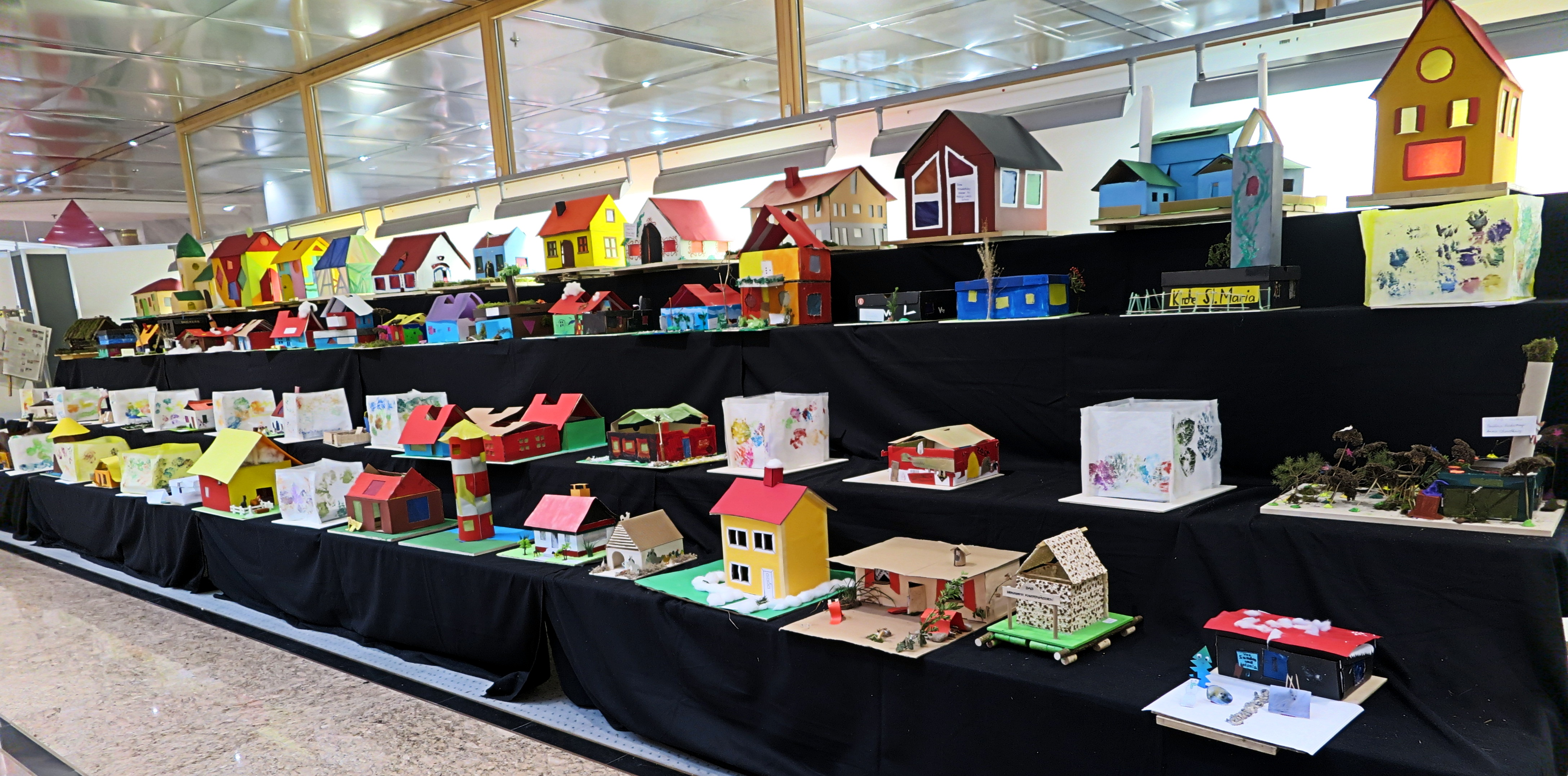 Deutschland, Bayern, Oberbayern, Landkreis Fürstenfeldbruck, Stadt Fürstenfeldbruck, Ausstellung der Lucienhäuschen in der Stadtsparkasse FFB, die am 13. Dezember 2014 mit brennenden Kerzen in den Fluß Amper gesetzt werden.